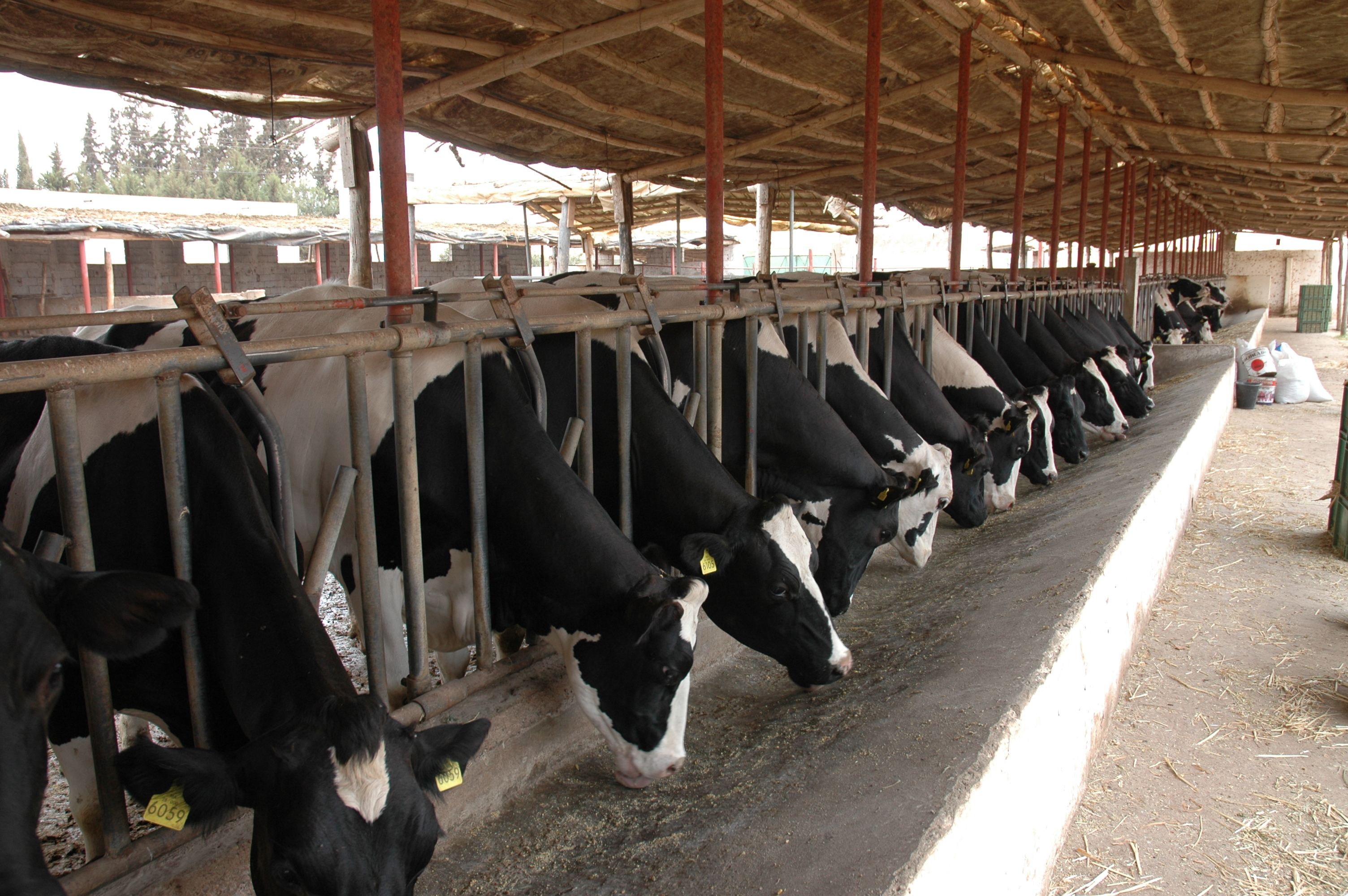 Elevage laitier dans la région du Souss - Distribution de la ration alimentaire à l'auge